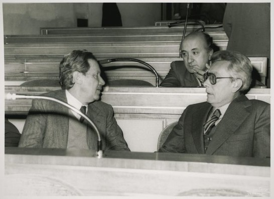 Centenario di De Gasperi